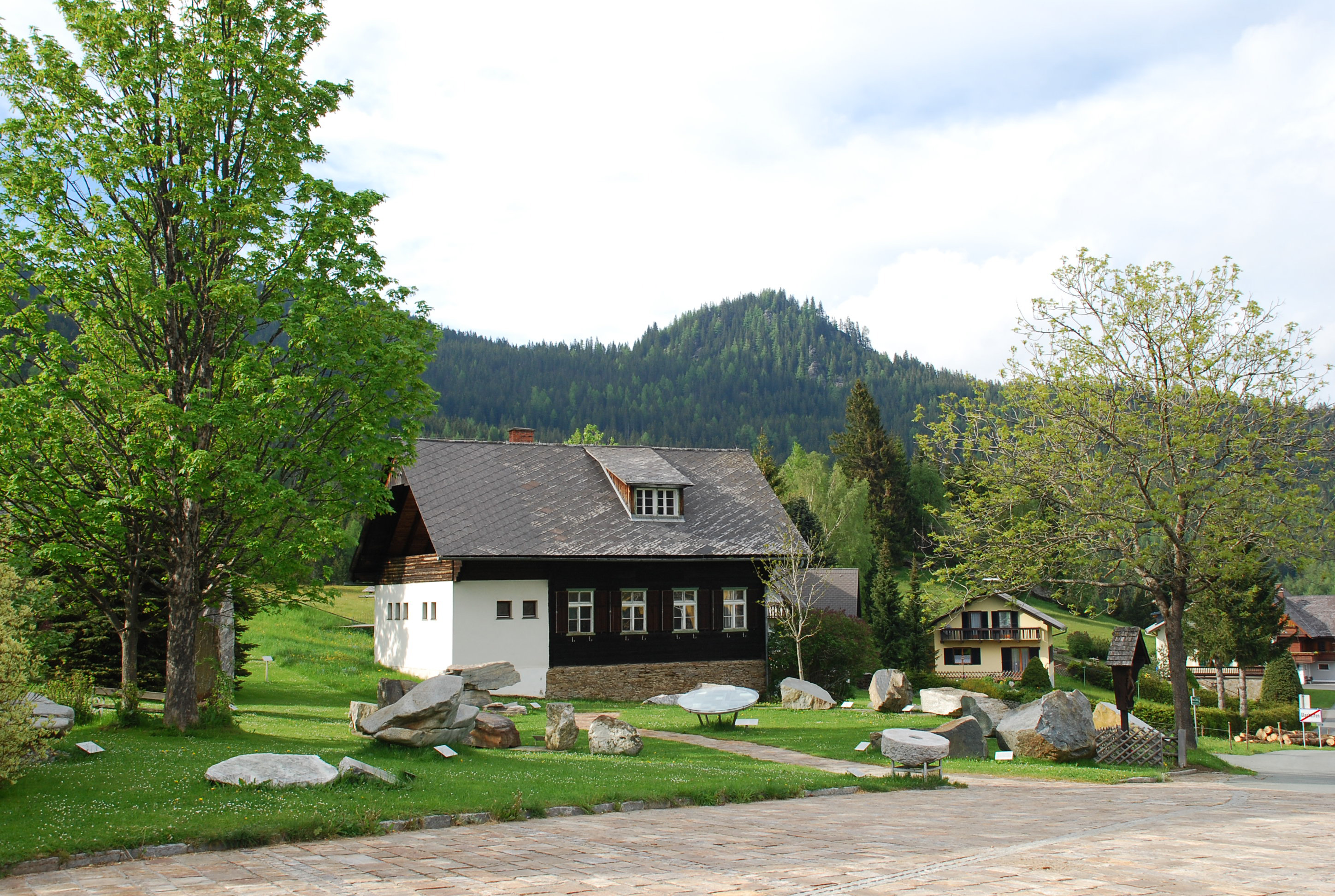 Geopark Glashütten (im Hof des alten Schulhauses), im Hintergrund der Kumpfkogel, Gemeinde Gressenberg, Steiermark, Österreich